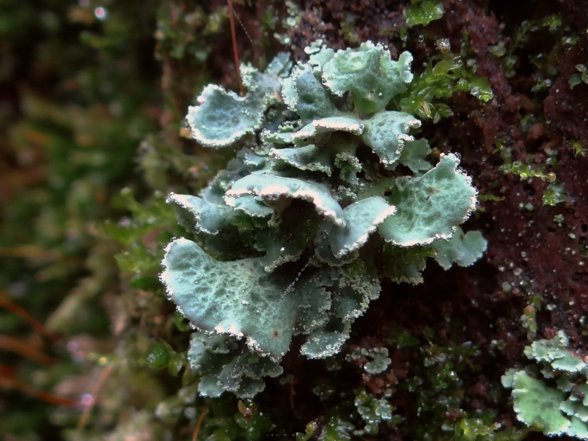 Cladonia digitata, plecha pierwotna (location:Poland, Łopień. Beskid Wyspowy)